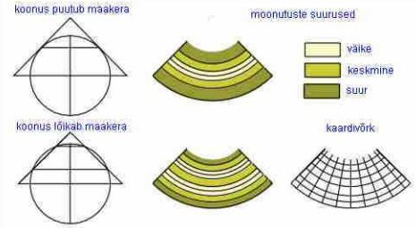 moonutus